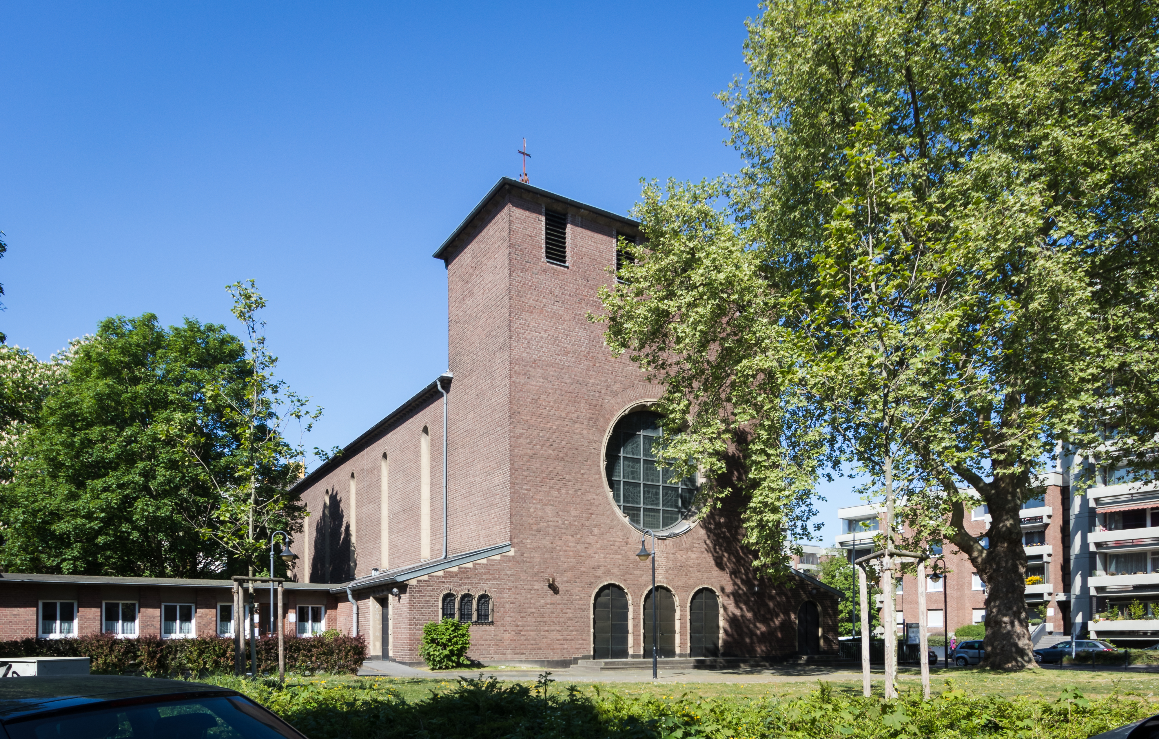 Kirche Heilig Kreuz, Köln-Weidenpesch. Architekt: Heinrich Bartmann, 1931